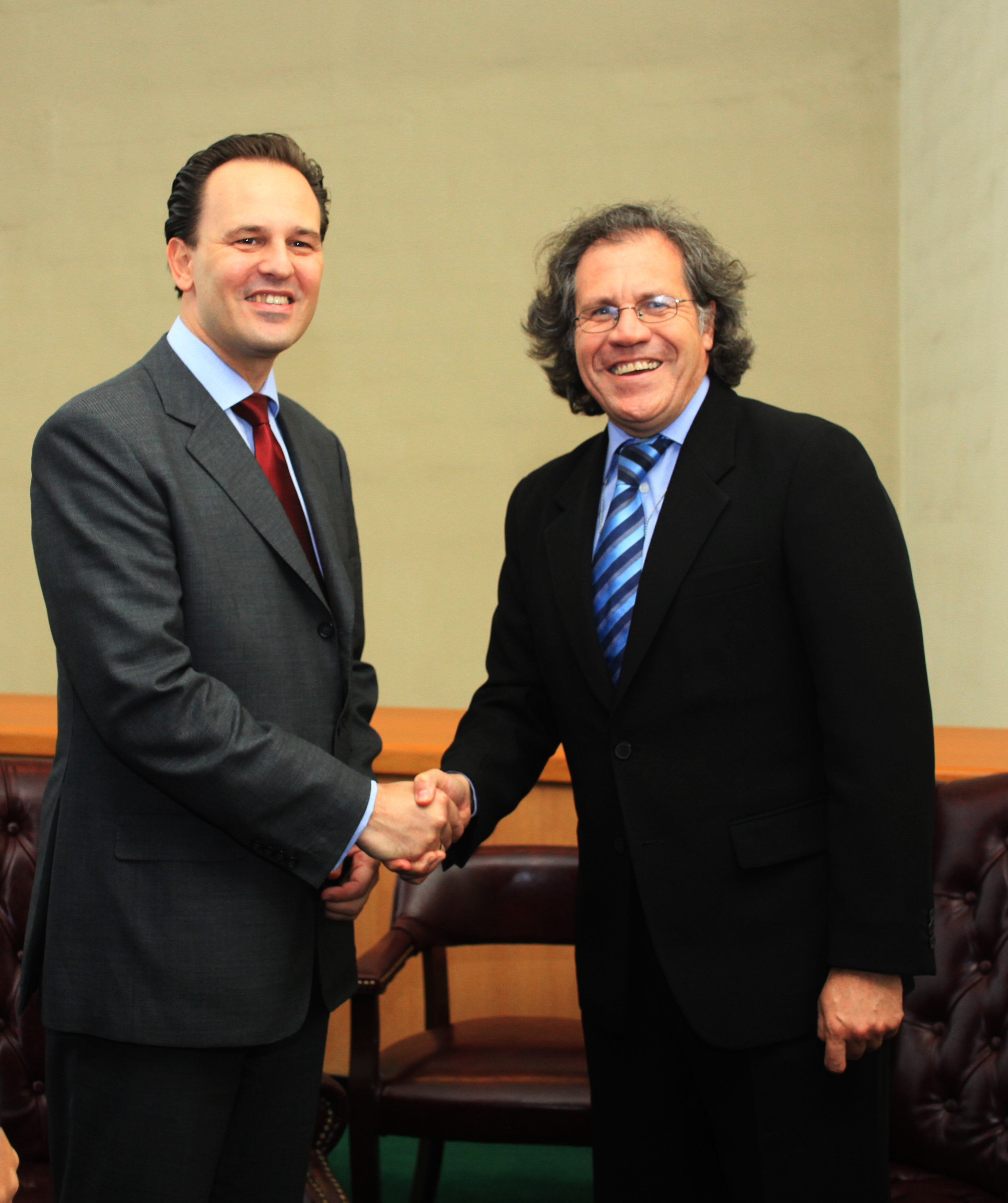 Συνάντηση ΥΠΕΞ κ. Δ. Δρούτσα με ΥΠΕΞ Ουρουγουάης κ. Luis Almagro (Νέα Υόρκη 27.09.10)